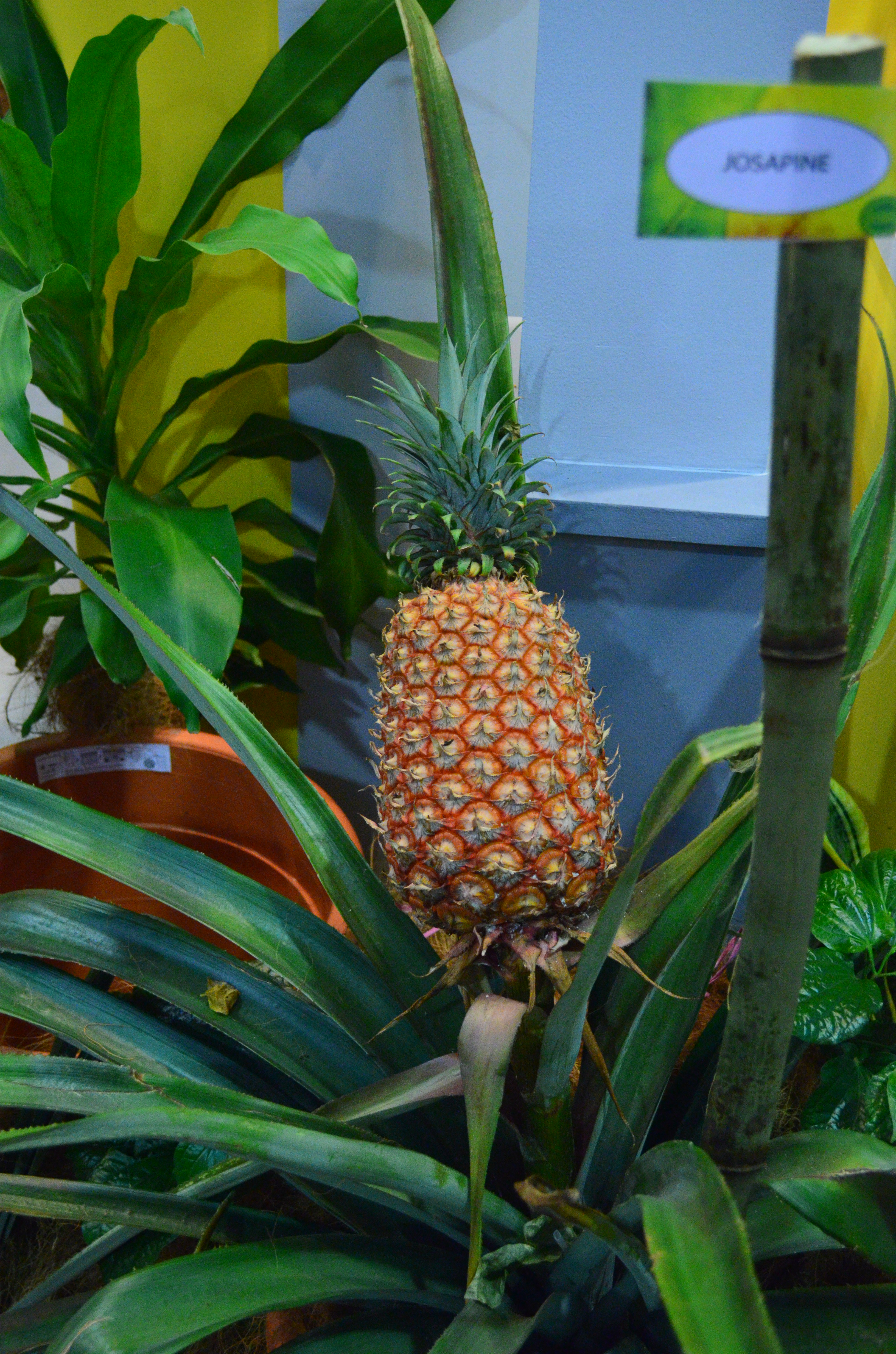 Nanas kultivar Josapine di pameran MAHA 2012.